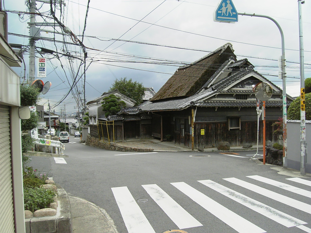 国道170号線旧道及び大阪府道15号線交点（大阪府八尾市） 写真手前－奥側が国道170号。右方向が大阪府道15号線（本交点が起点）。